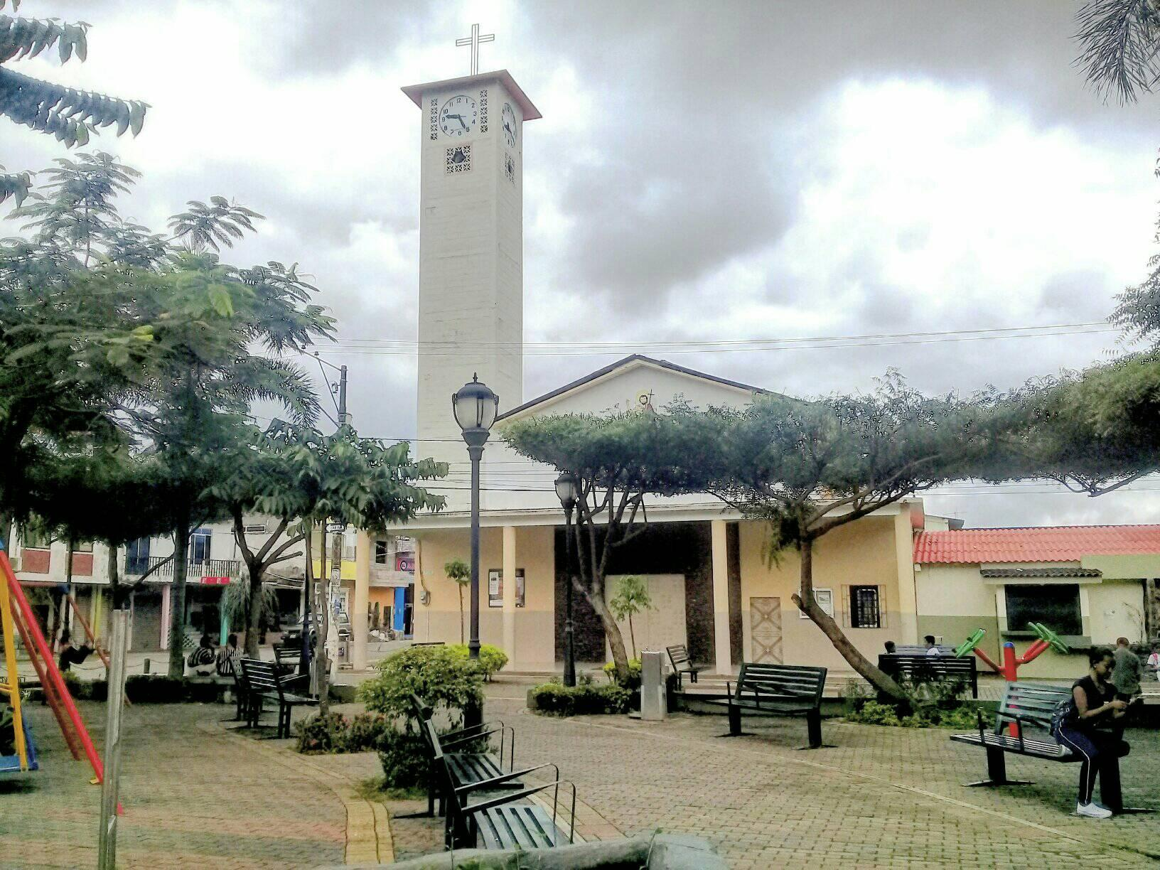 Iglesia de San Juan Bautista, en San Juan, Los Ríos, Ecuador.